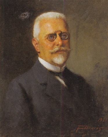 Arthur Ferraris - Bundeskanzler Dr. Johann Schober, 1931. Oil on Canvas. 36,5 x 29,5 cm (14,4 x 11,6 in)